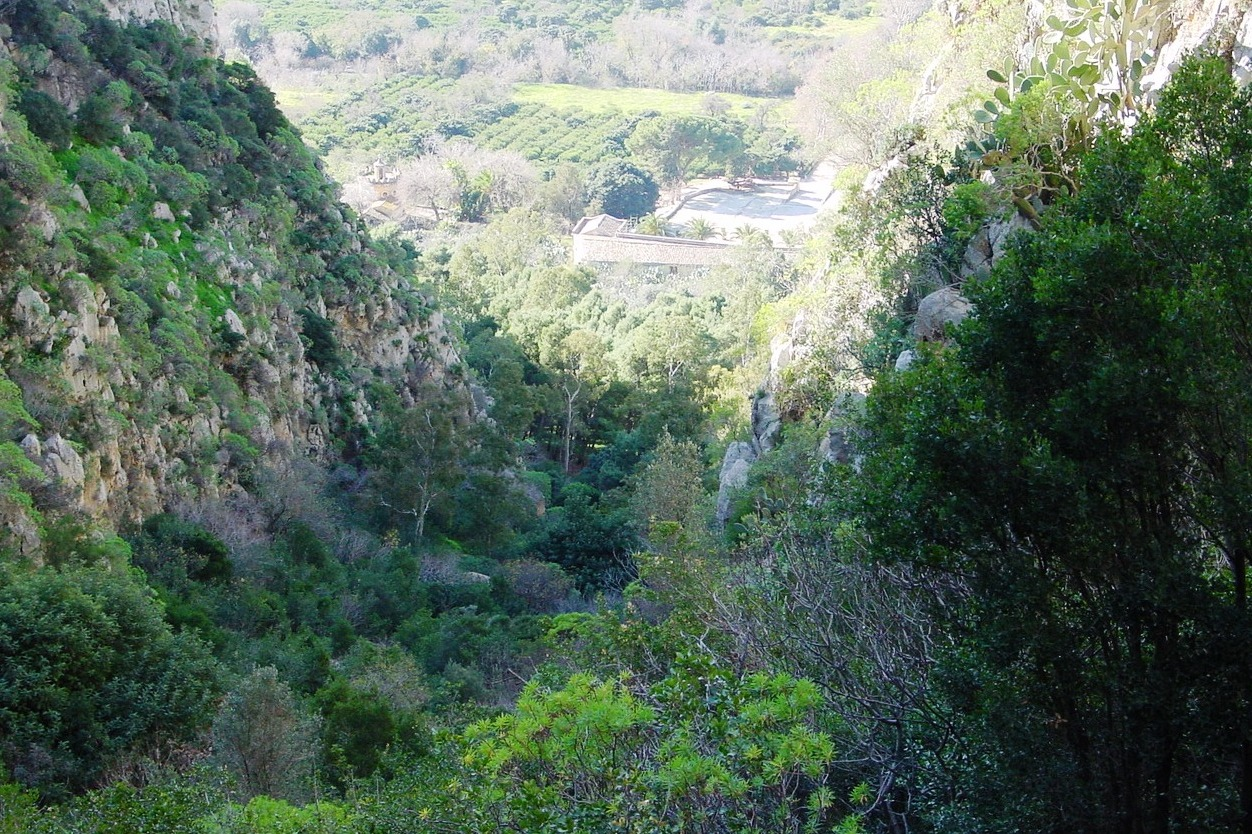 Riserva naturale Monte Pellegrino Palermo, Sicily Valle del Porco